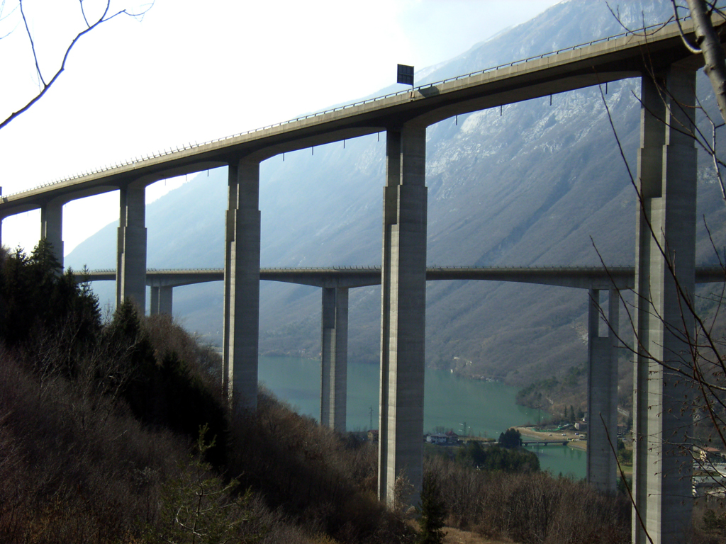 Autostrada Venezia-Belluno (Se non mi sbaglio...) Viadotto Fadalto